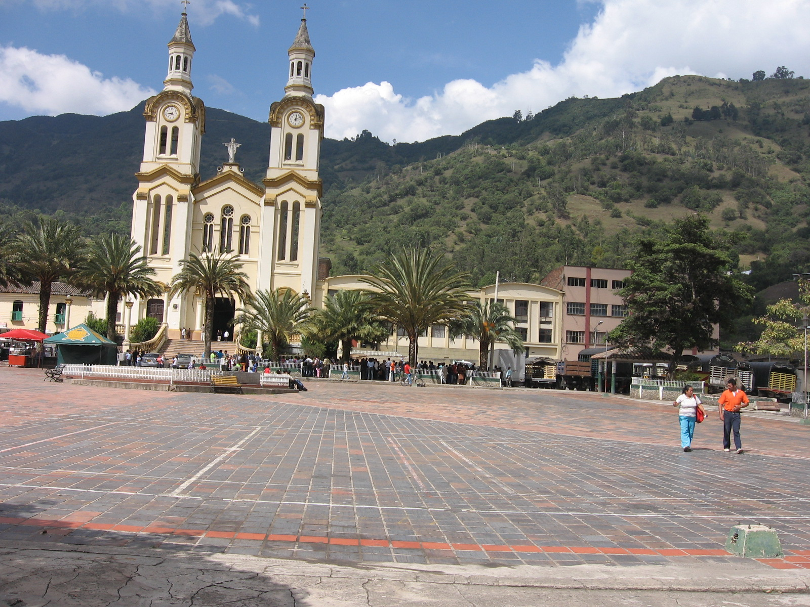 Parque principal del municipio de Boavita Boyacá Colombia